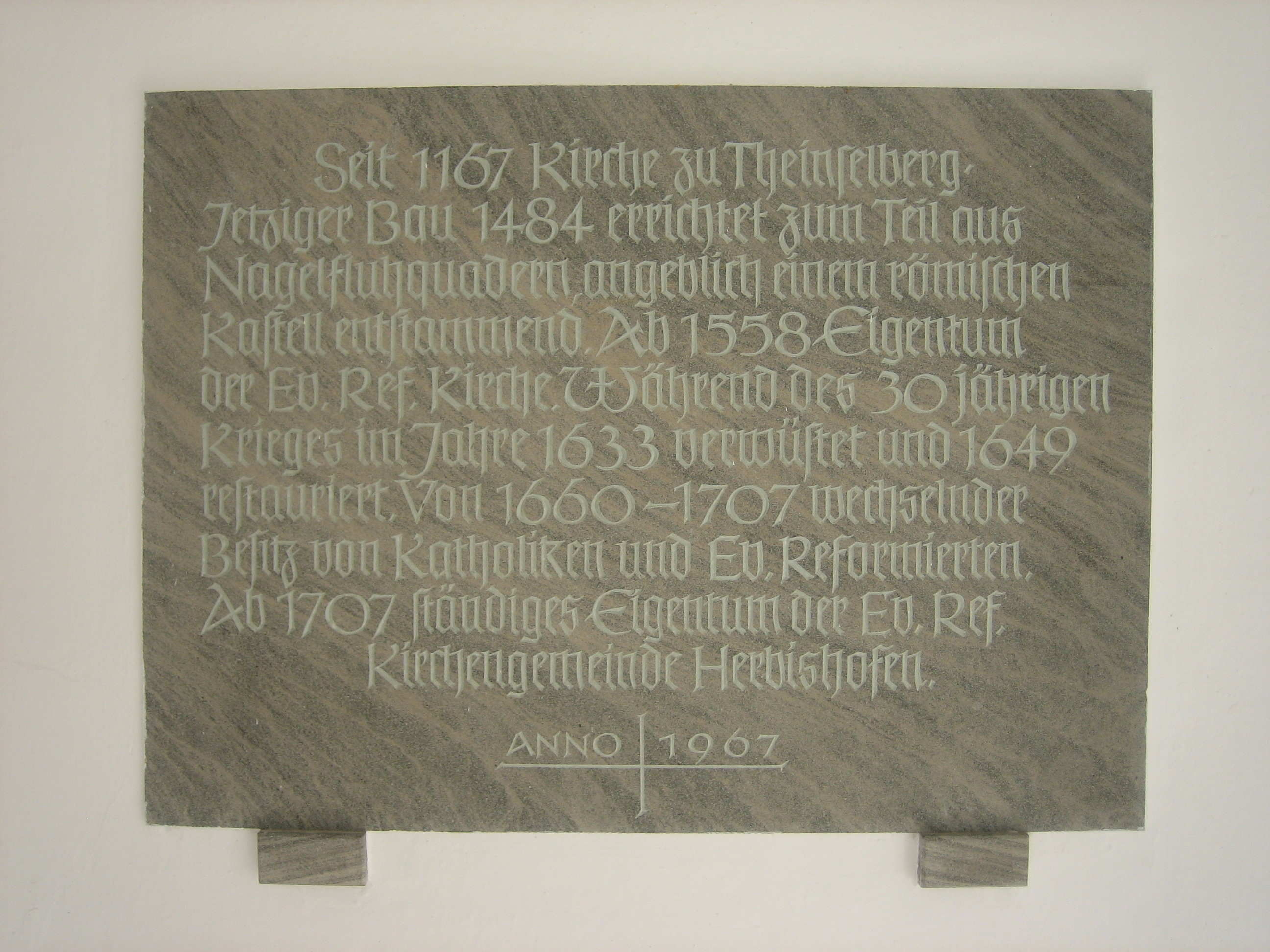 Ev. Ref. Pfarrkirche Theinselberg, Gemeinde Lachen, Landkreis Unterallgäu, Bayern